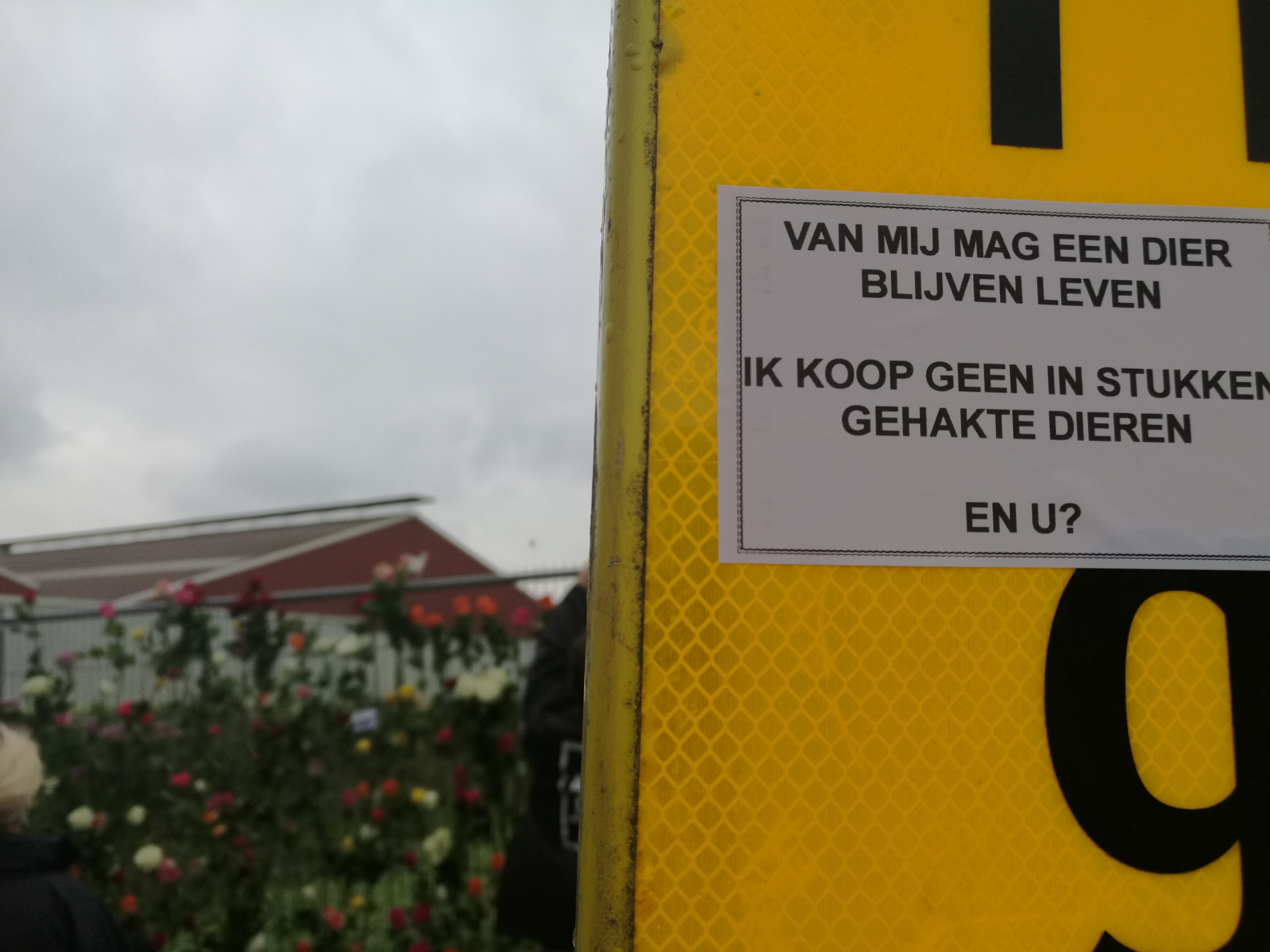 Op 29 juli 2017 hielden dierenliefhebbers en -activisten van verschillende groepen een wake voor de circa 20.000 varkens die twee dagen eerder waren omgekomen bij de stalbrand op boerderij De Knorhof in Erichem. Zij herdachten de dieren en protesteerden tegen dierenleed.